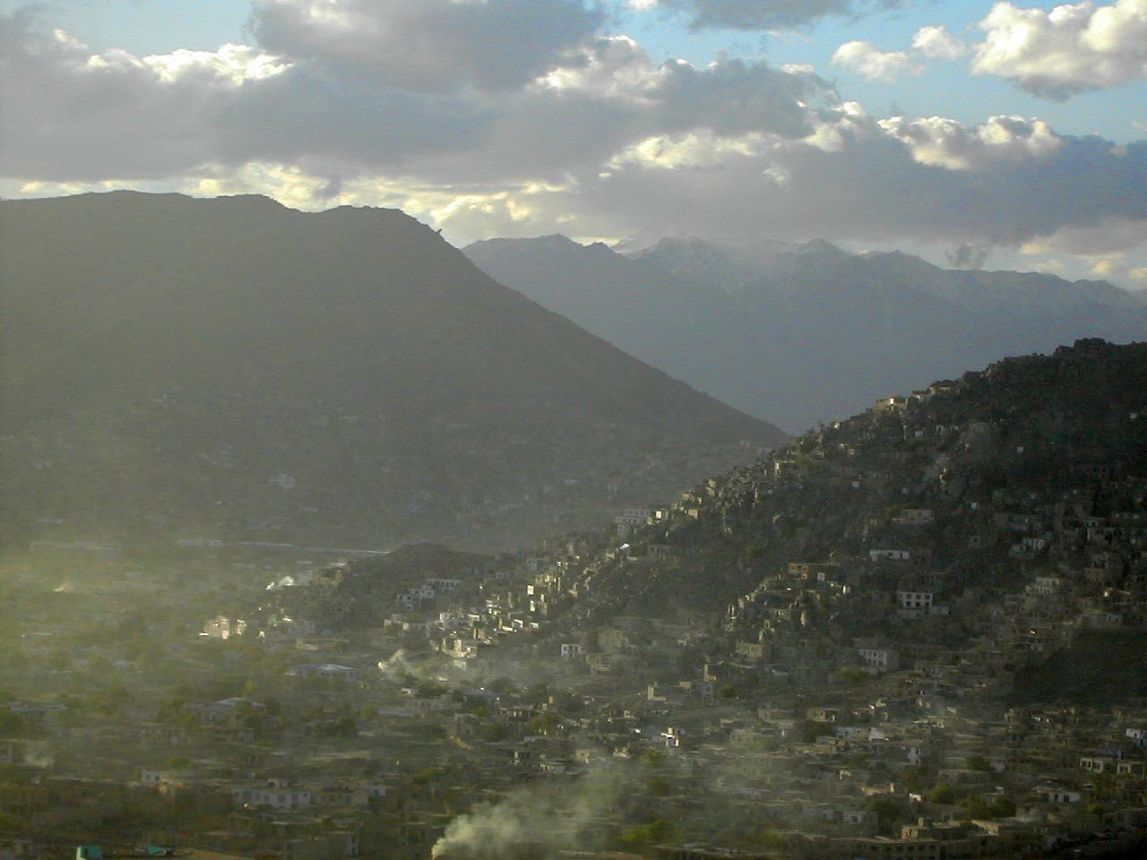 Kabul, Afghanistan